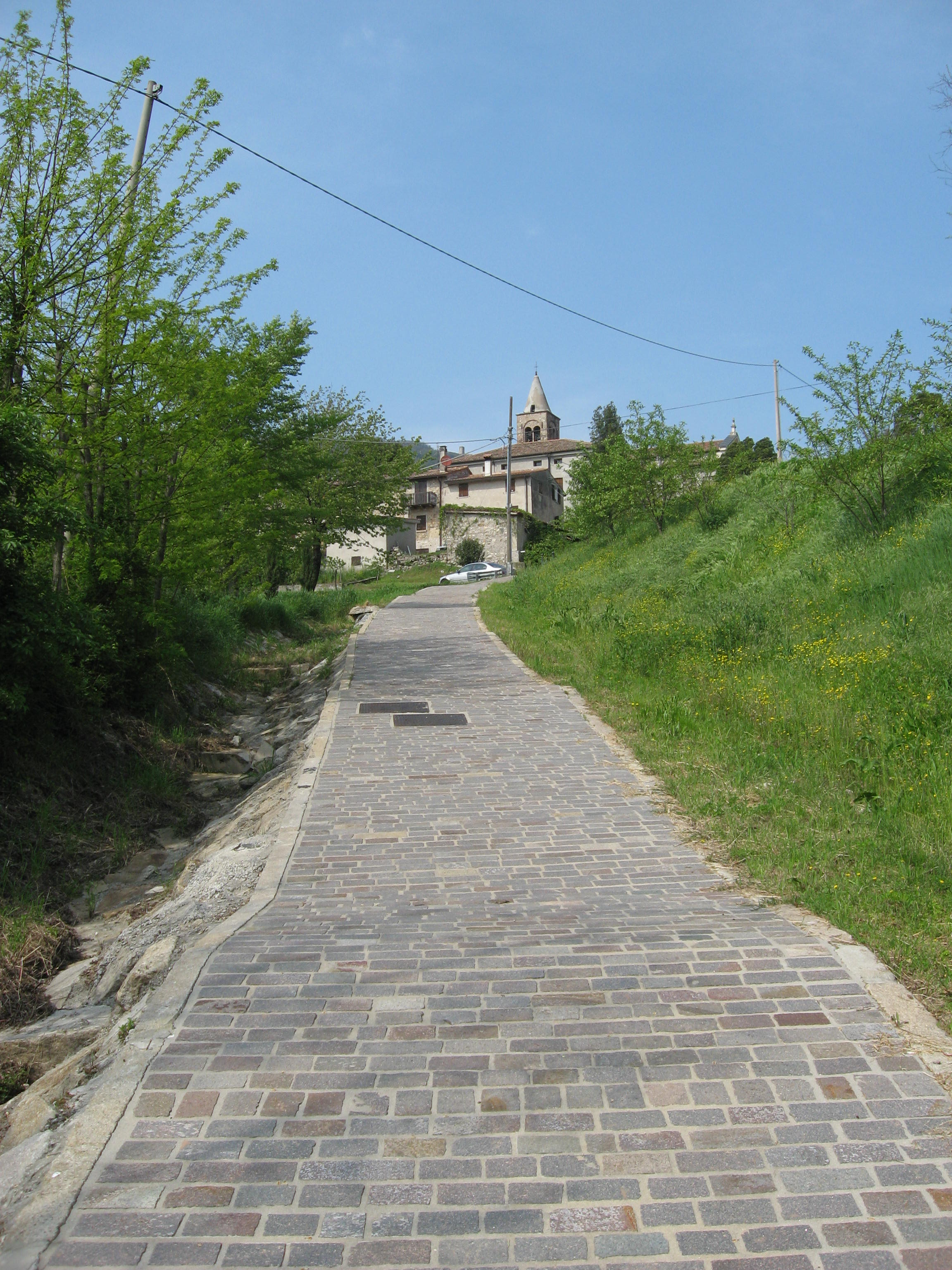 Faedo, frazione di Cinto Euganeo: veduta del centro.